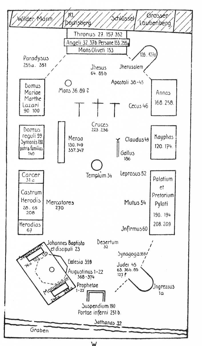 Julius Petersen Frankfurter Passionsspiel 1450 Zeitschrift für deutsches Altertum 59 1921/22, S. 122